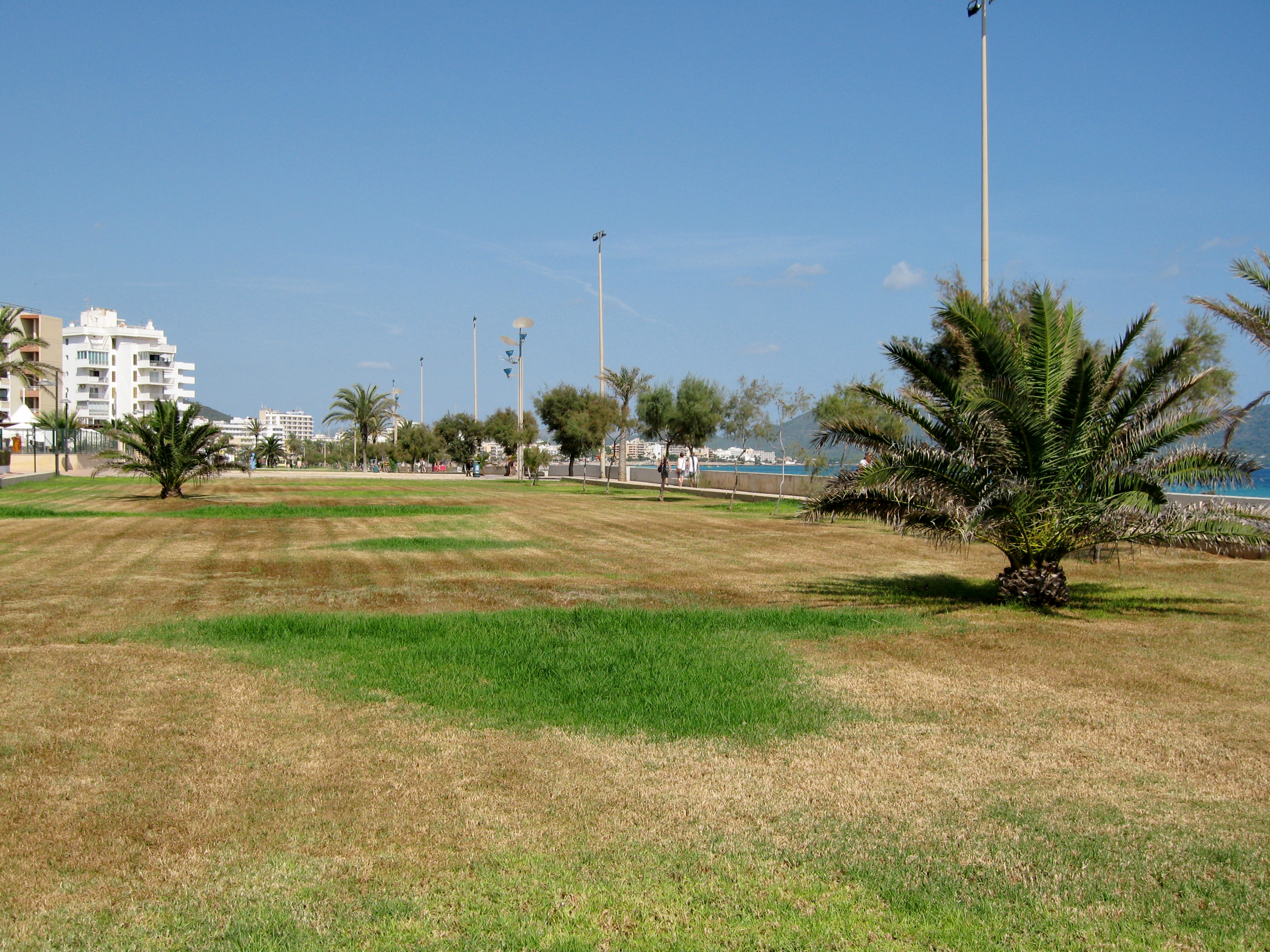 Passeig de la Mar, Cala Millor, Sant Llorenç des Cardassar, Mallorca, Spain